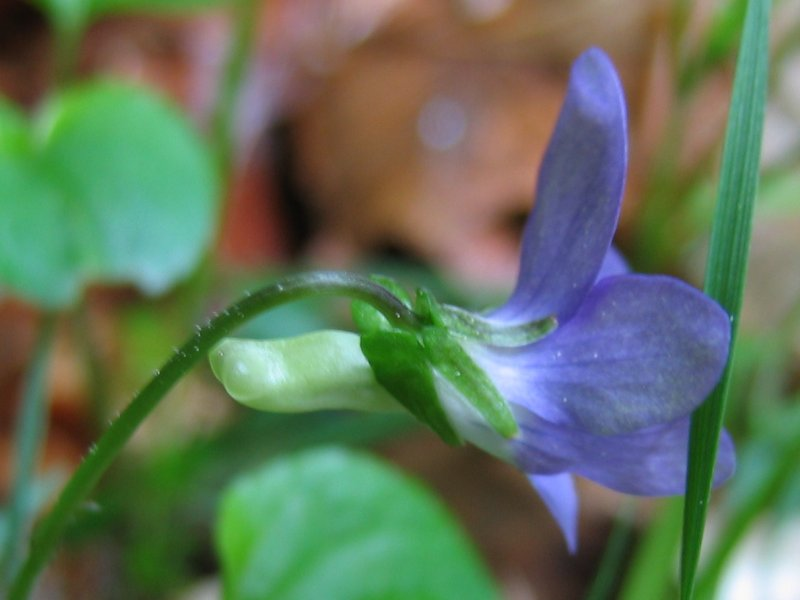 Hain-Veilchen mit schneeweißem Sporn Viola riviniana, Nähe Binz auf Rügen